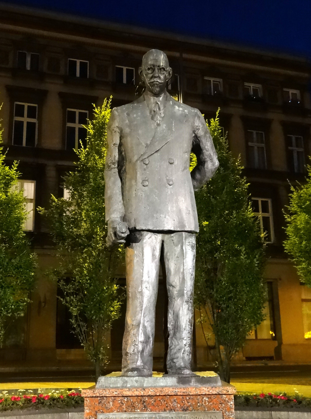 Pomnik przedwojennego prezydenta Bydgoszczy Leona Barciszewskiego ustawiony na Wełnianym Rynku